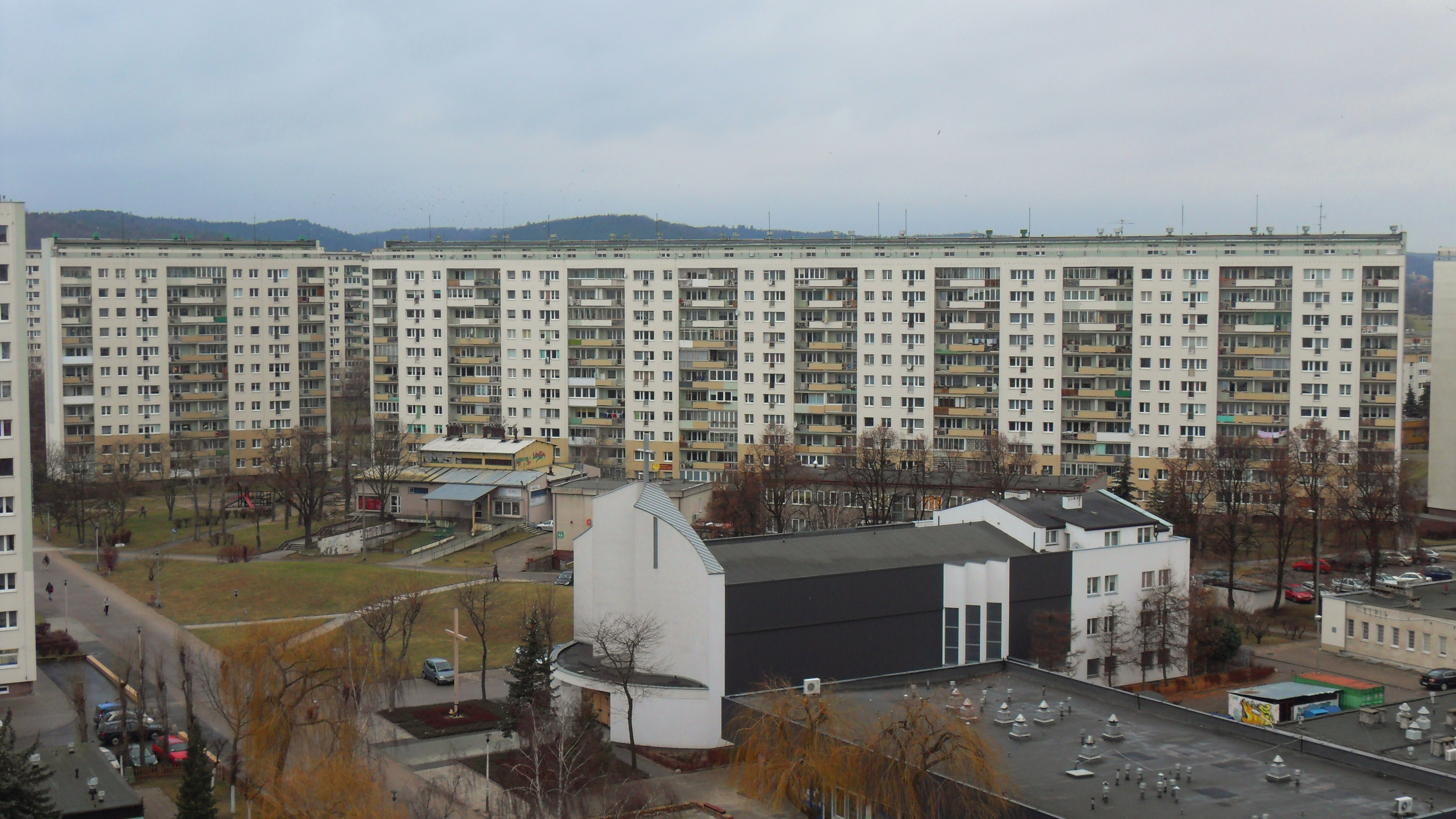 Gdańsk Żabianka, ul. Gdyńska 7 i 5.